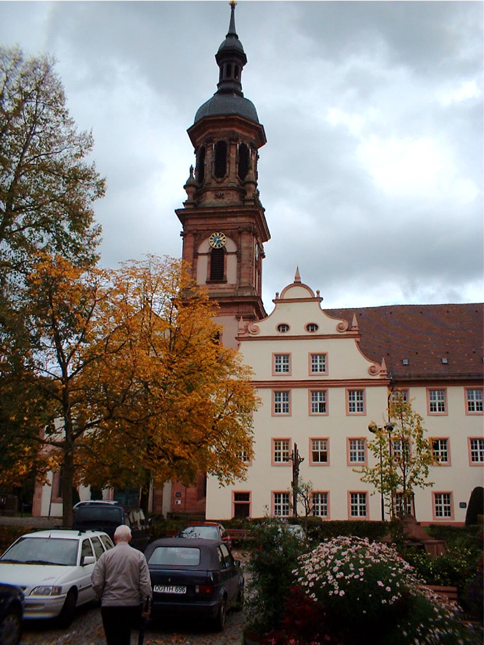 Stadtkirche in Gengenbach im Schwarzwald